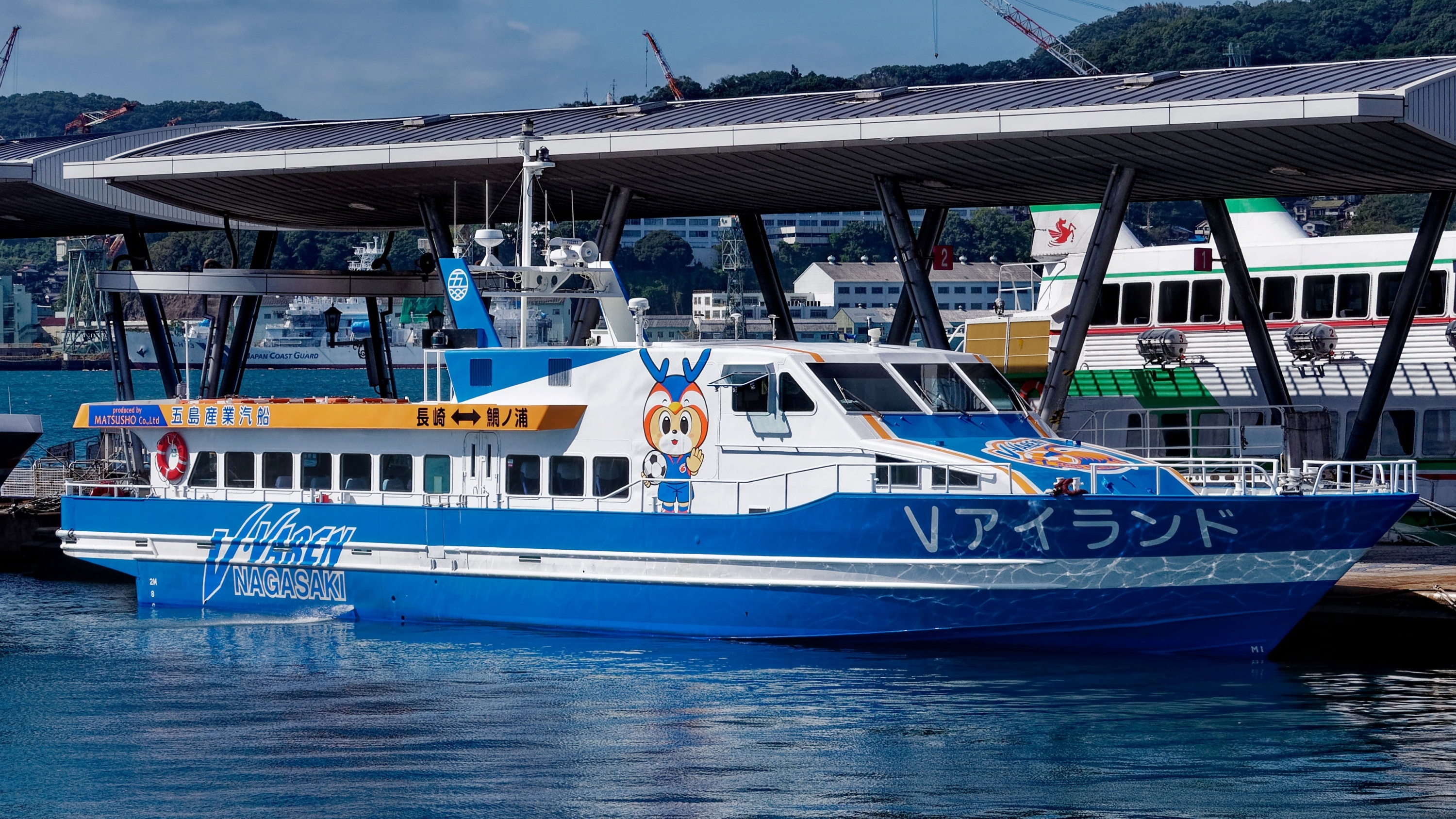 長崎港に停泊中の五島産業汽船の高速船「Ⅴ（ファイブ）アイランド」。2019年9月に「ありかわ8号」より改名された。